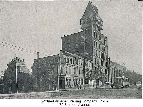 Brewery Krueger in Newark - New Jersey - States